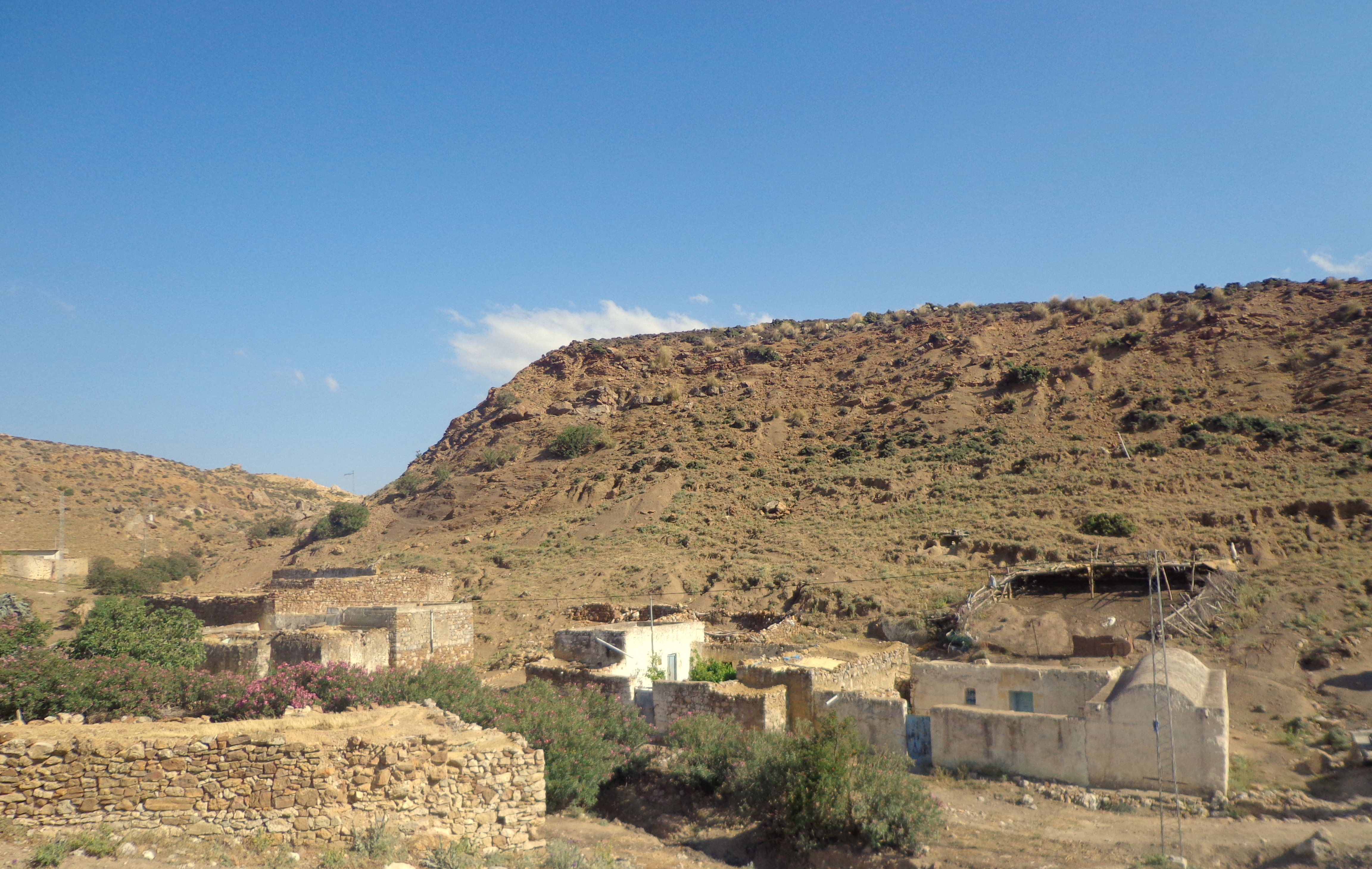 village de sidi medien